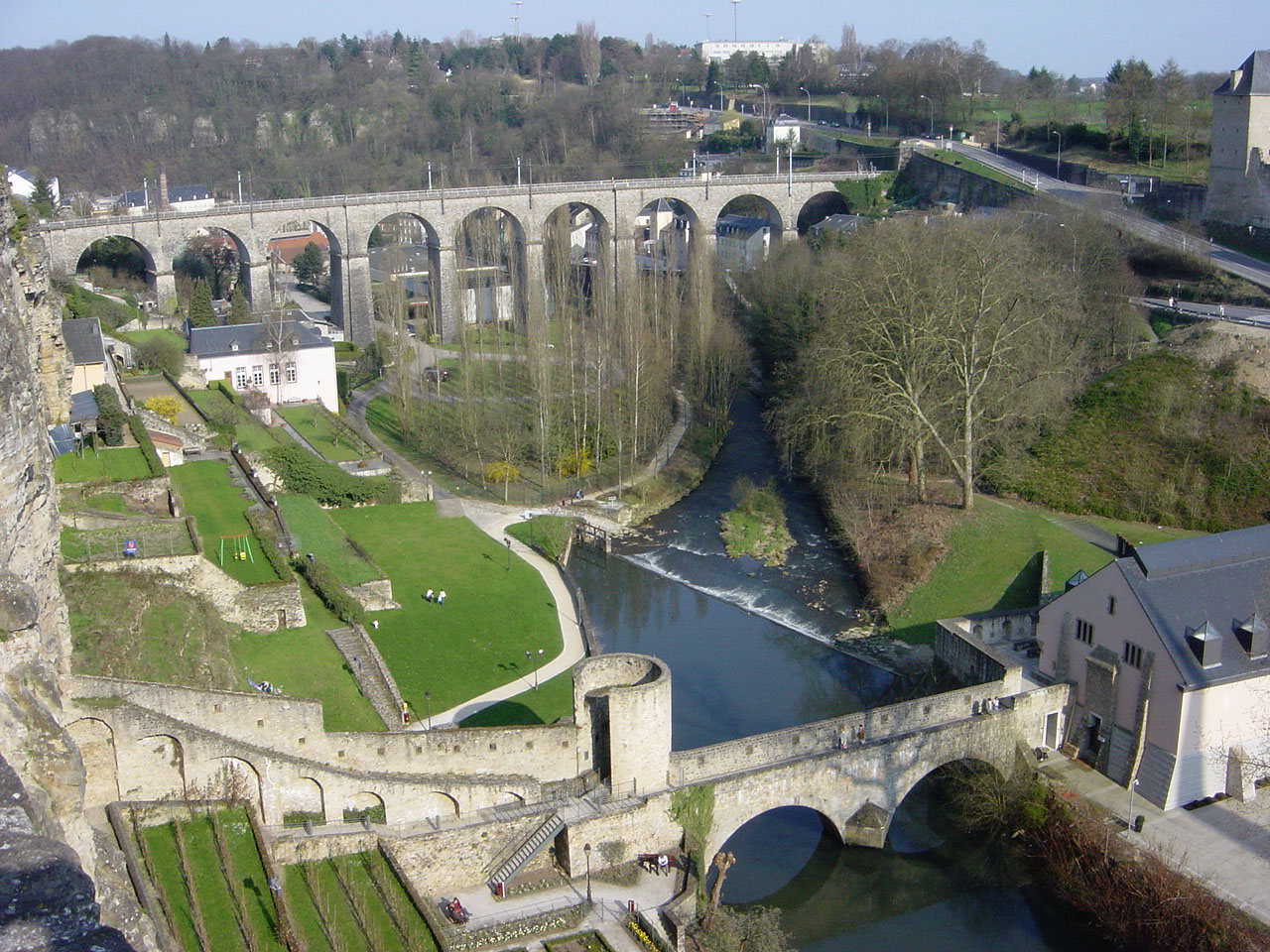 D'Bréck Stierchen iwwert der Uelzecht am stater Gronn, am Hannergrond d'Eisebunnsbréck.